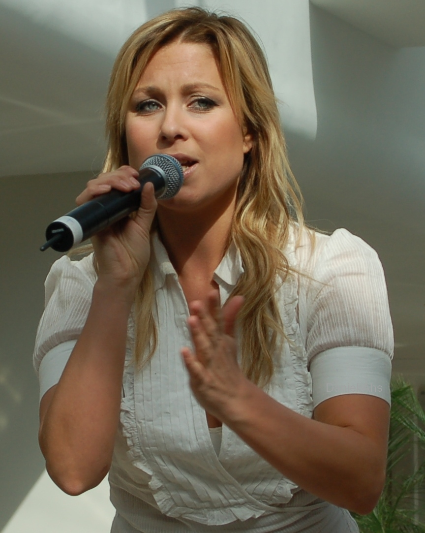 Jenny "Velvet" Pettersson sjunger på Linden köpcentrum i Norrköping